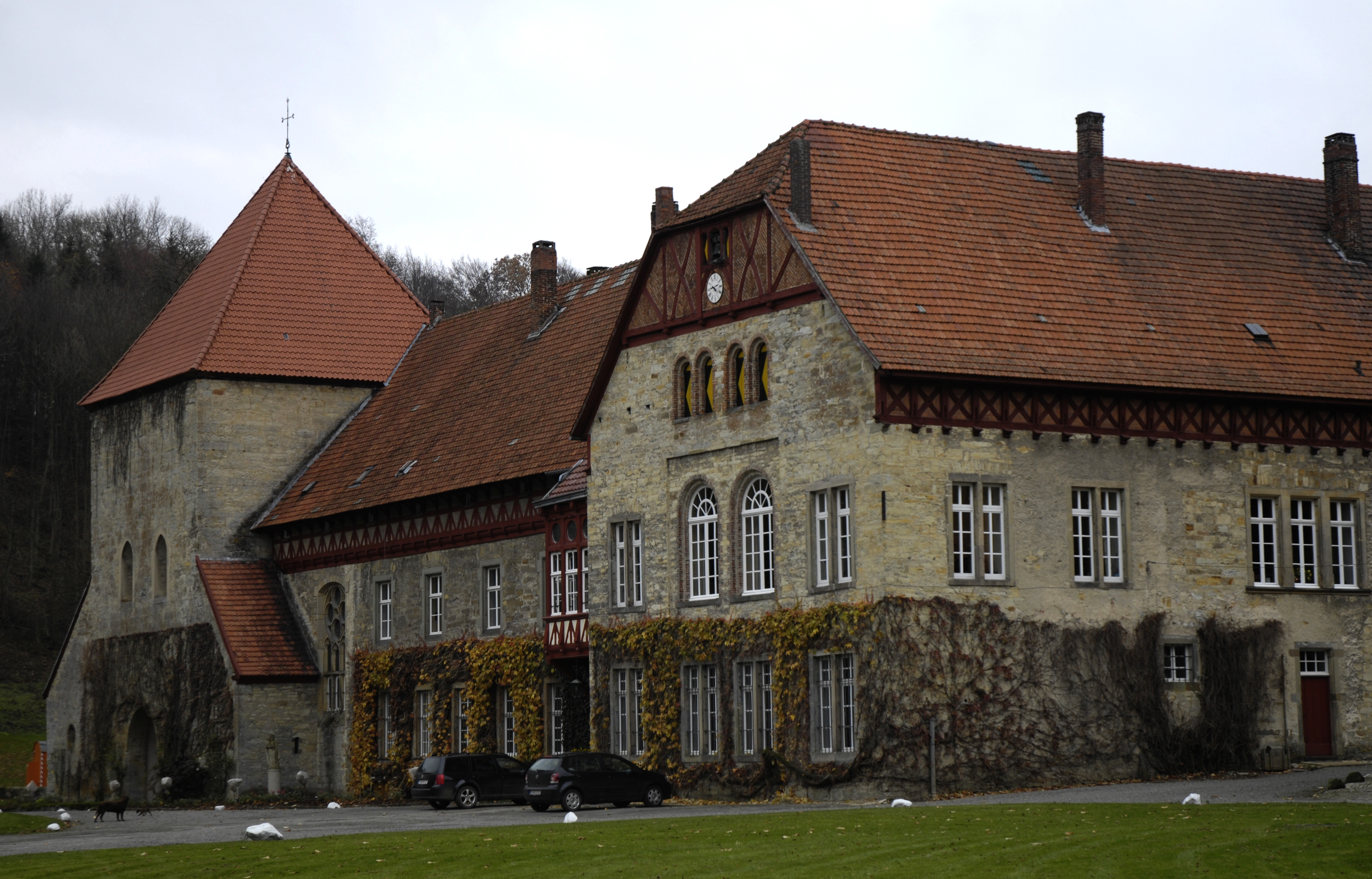 Ehemaliges Kloster Böddeken, Innenhof